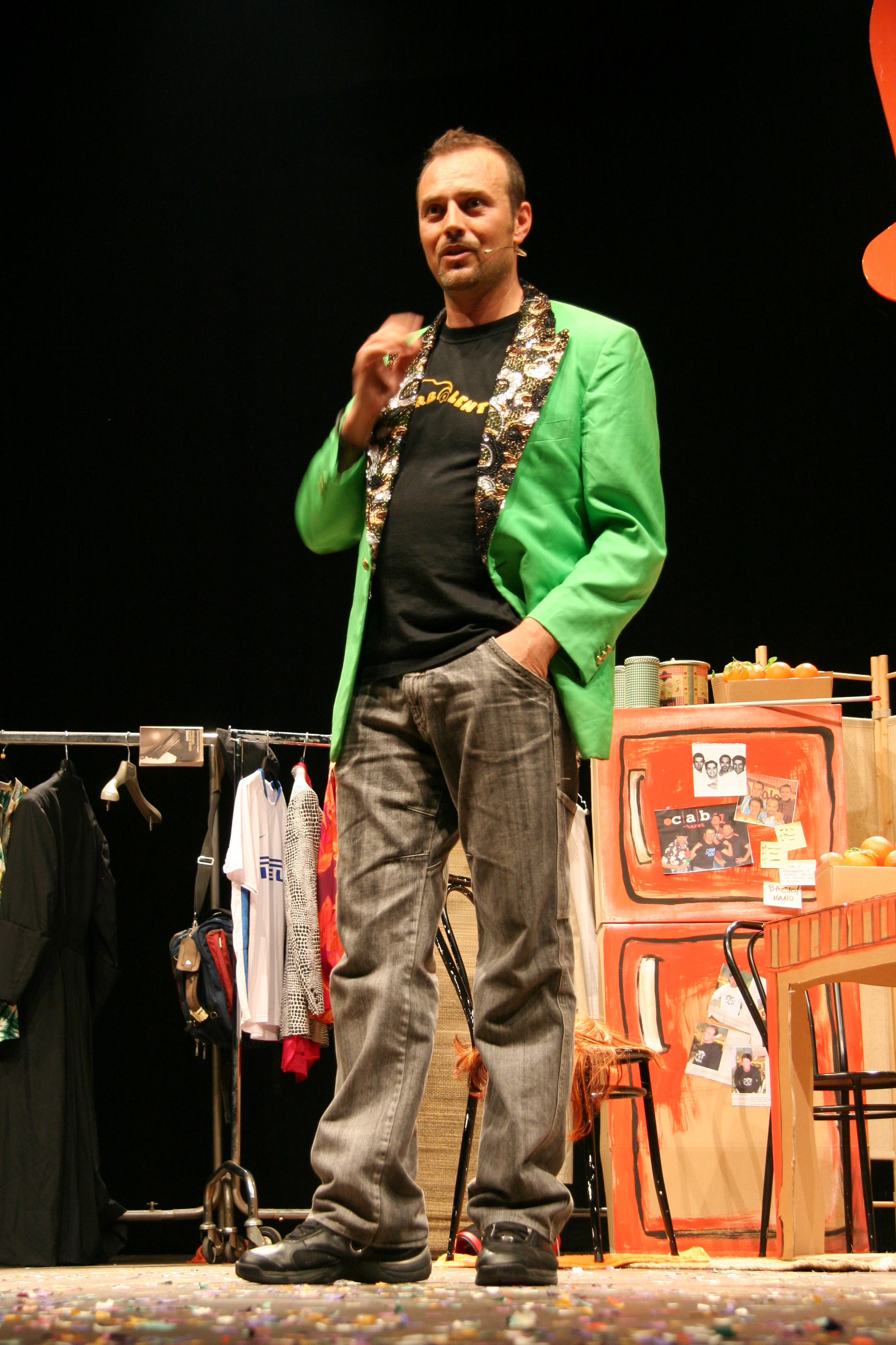 Il comico cabarettista Enzo Polidoro, fotografato durante lo spettacolo teatrale con il quartetto "I Turbolenti", Milano 2 Aprile 2007